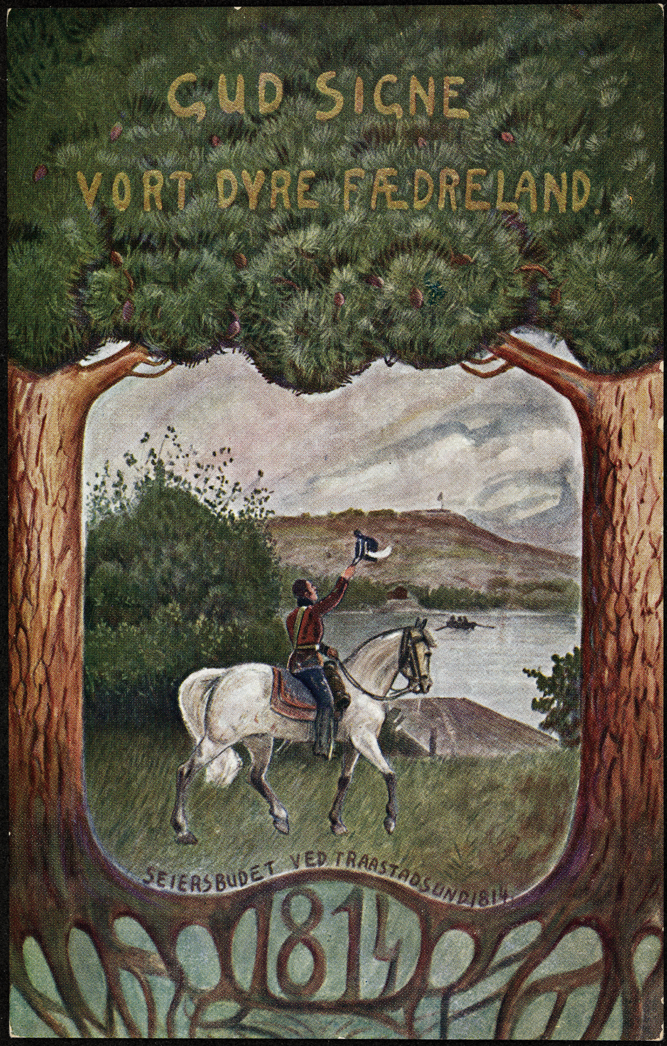 Tittel / Title: Gud signe vort dyre Fædreland : Seiersbudet ved Traastadsund 1814 Beskrivelse / Description: Postkort. Dato / Date: 1914 Kunstner / Artist: ukjent / unknown Utgiver / Publisher: ukjent / unknown Eier / Owner Institution: Nasjonalbiblioteket / National Library of Norway Lenke / Link: Bildesignatur / Image Number: blds_05717